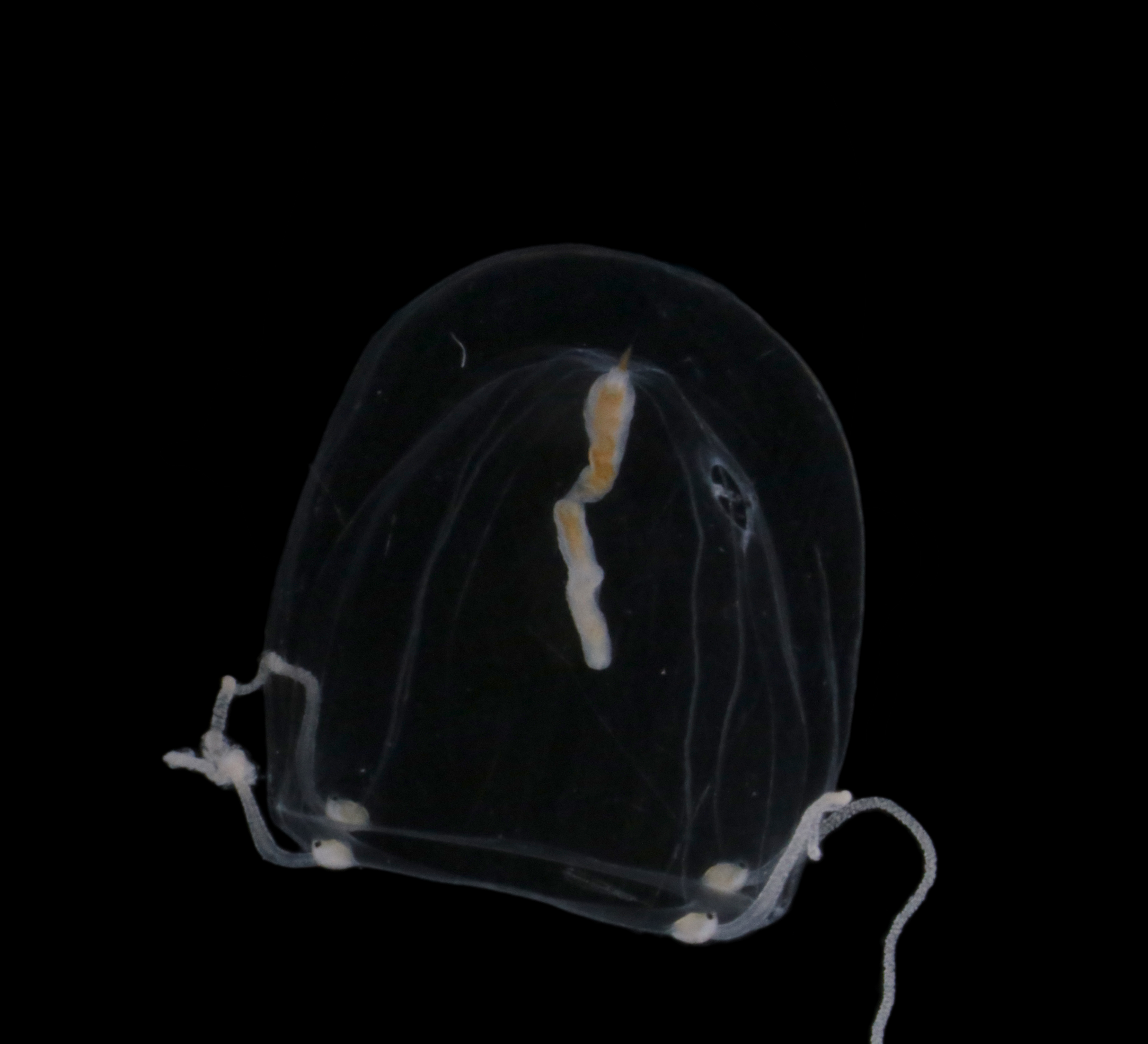 Sarsia tubulosa